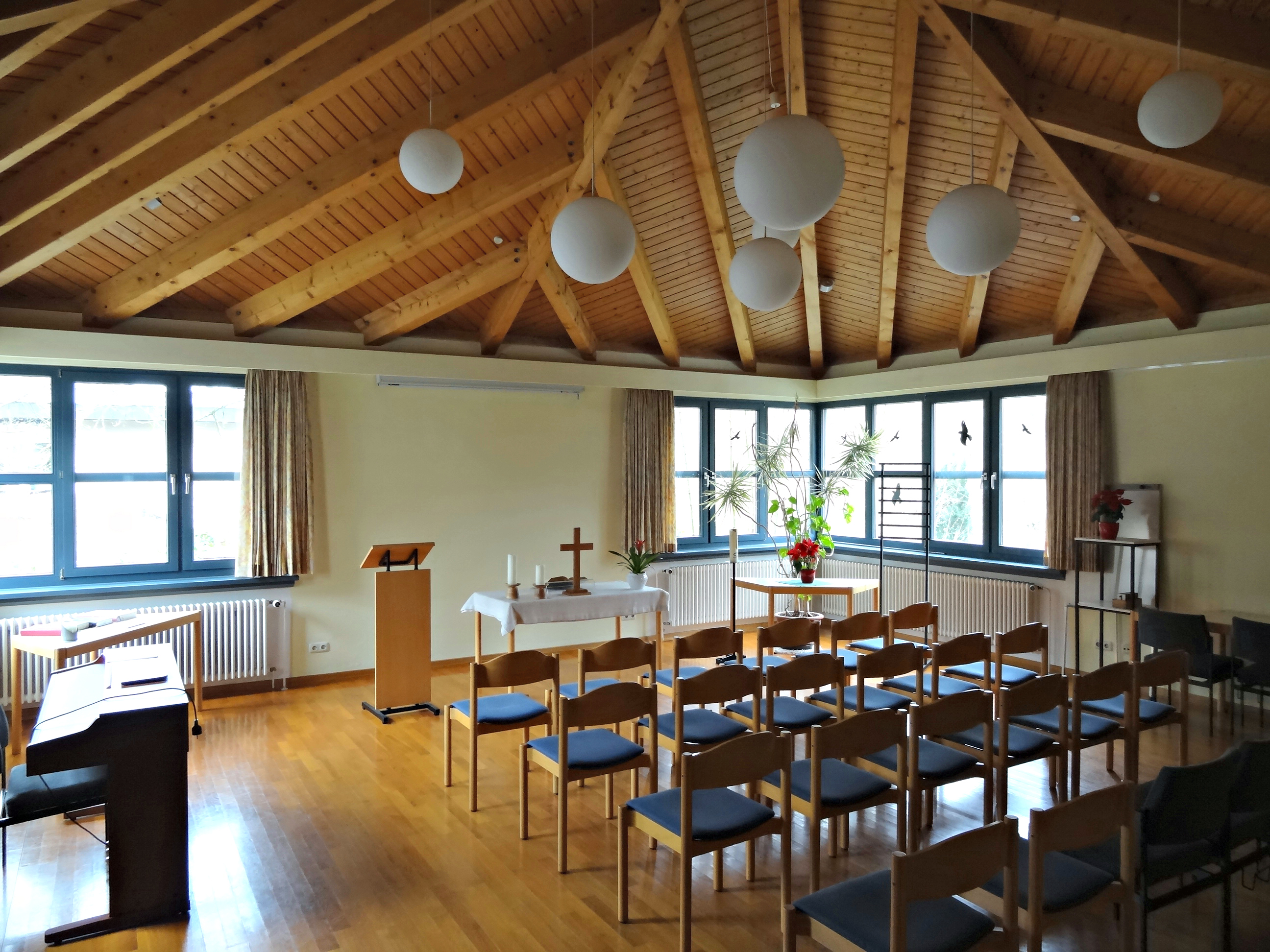 Evangelische Kapelle (Bad Salzhausen)